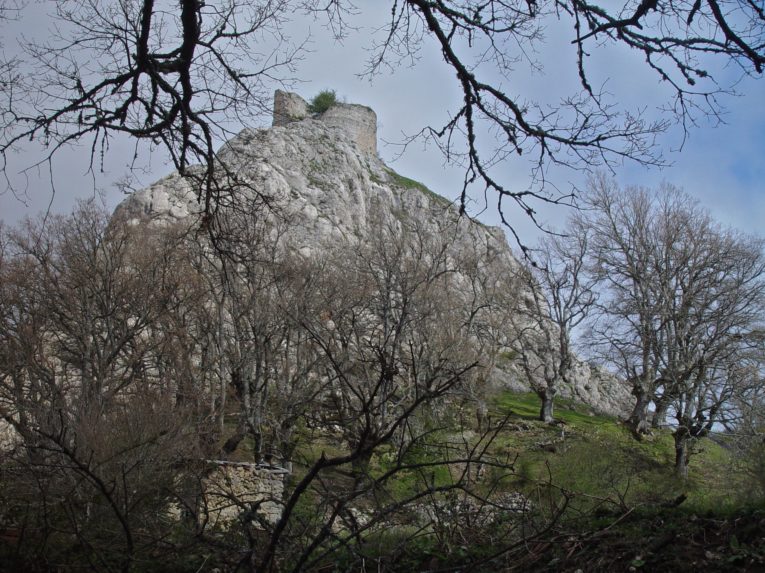 Araiako Marutegiko gazteluaren hondakinak